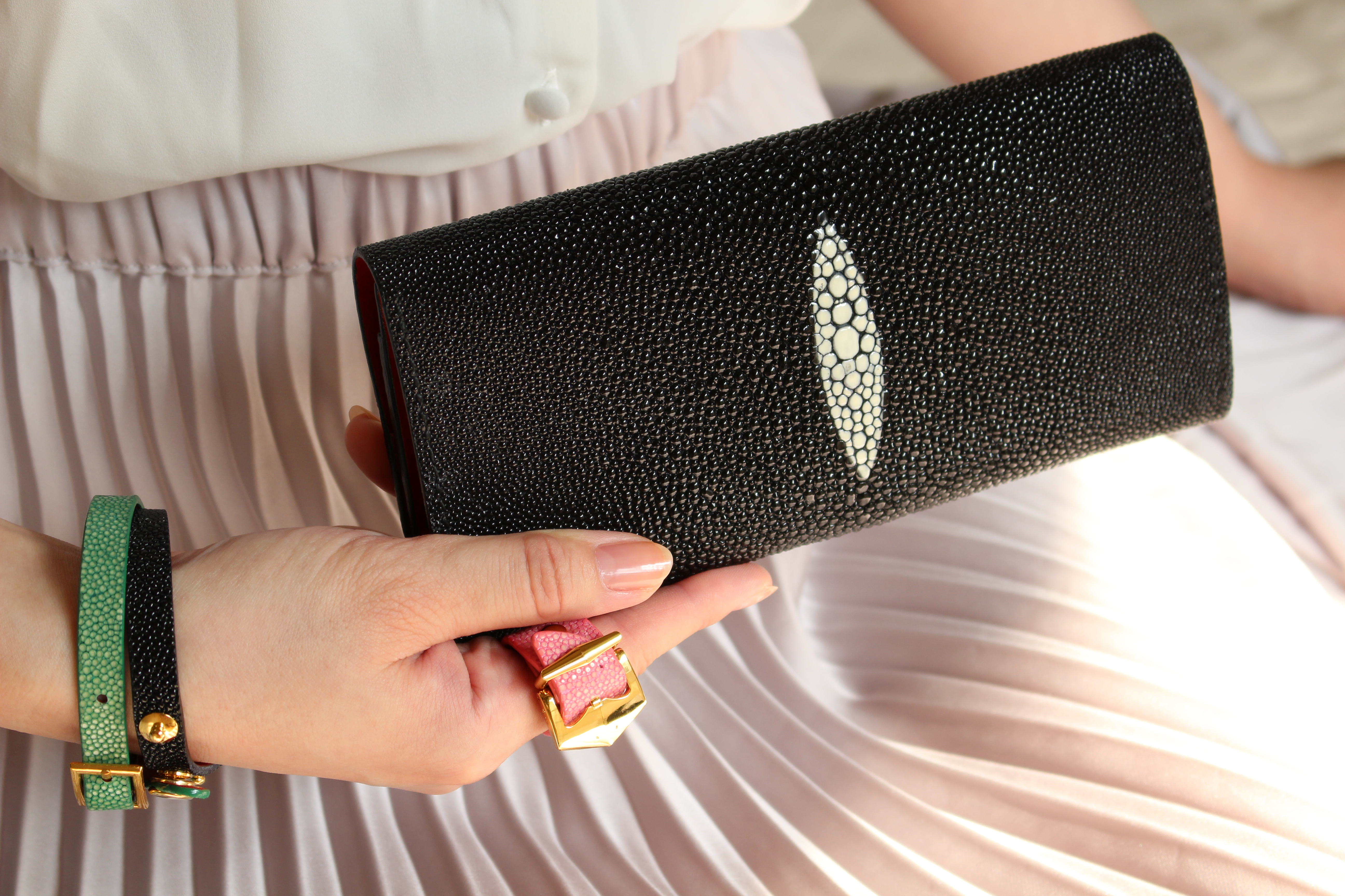 手縫製で作られた《ルナロッサ・ヨッピー》のエイ革財布